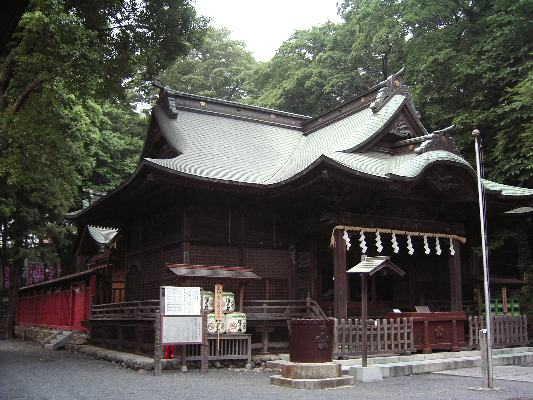 谷保天満宮の拝殿。